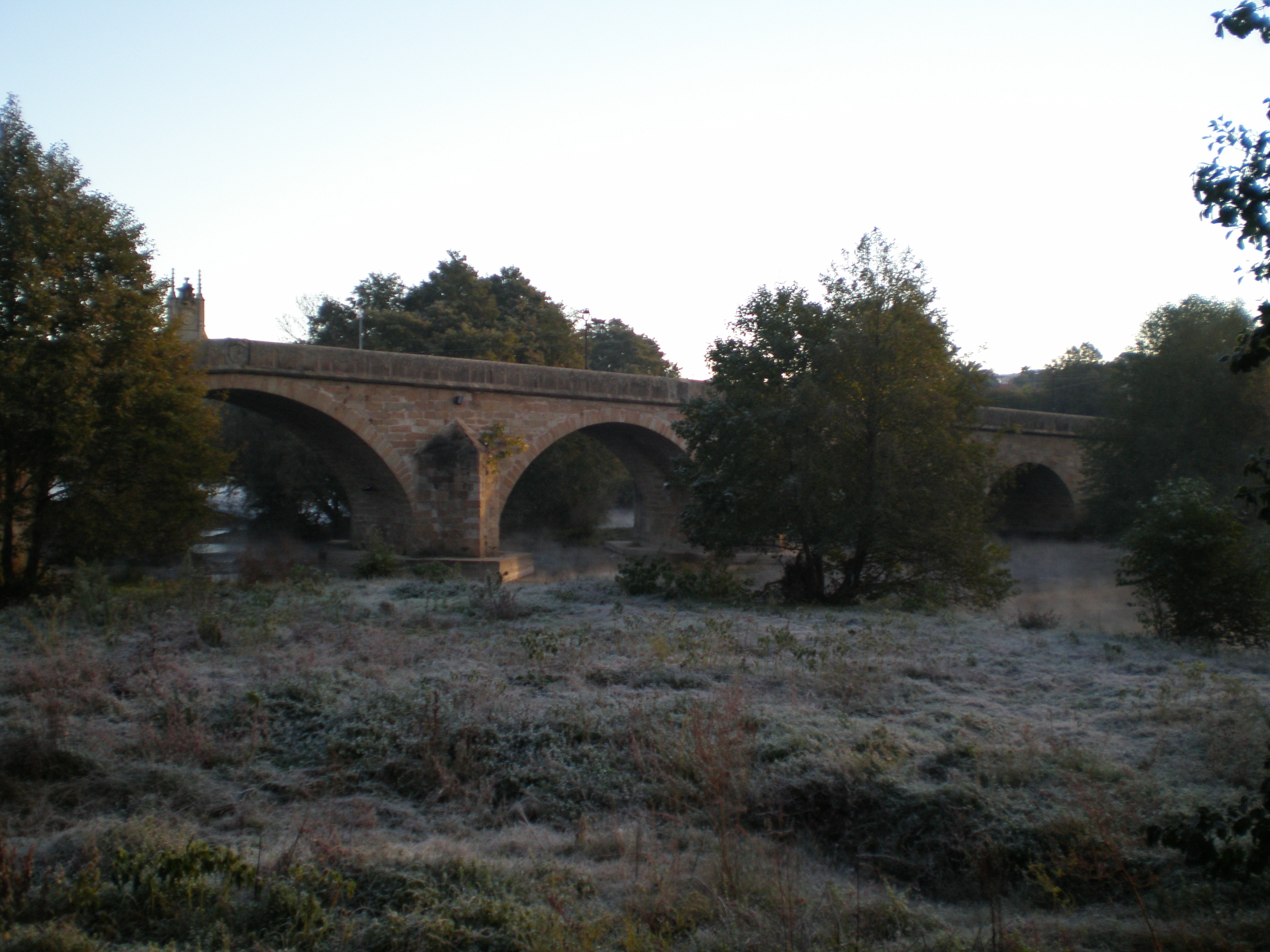 Puente nuevo en PLasencia, visto desde la Isla